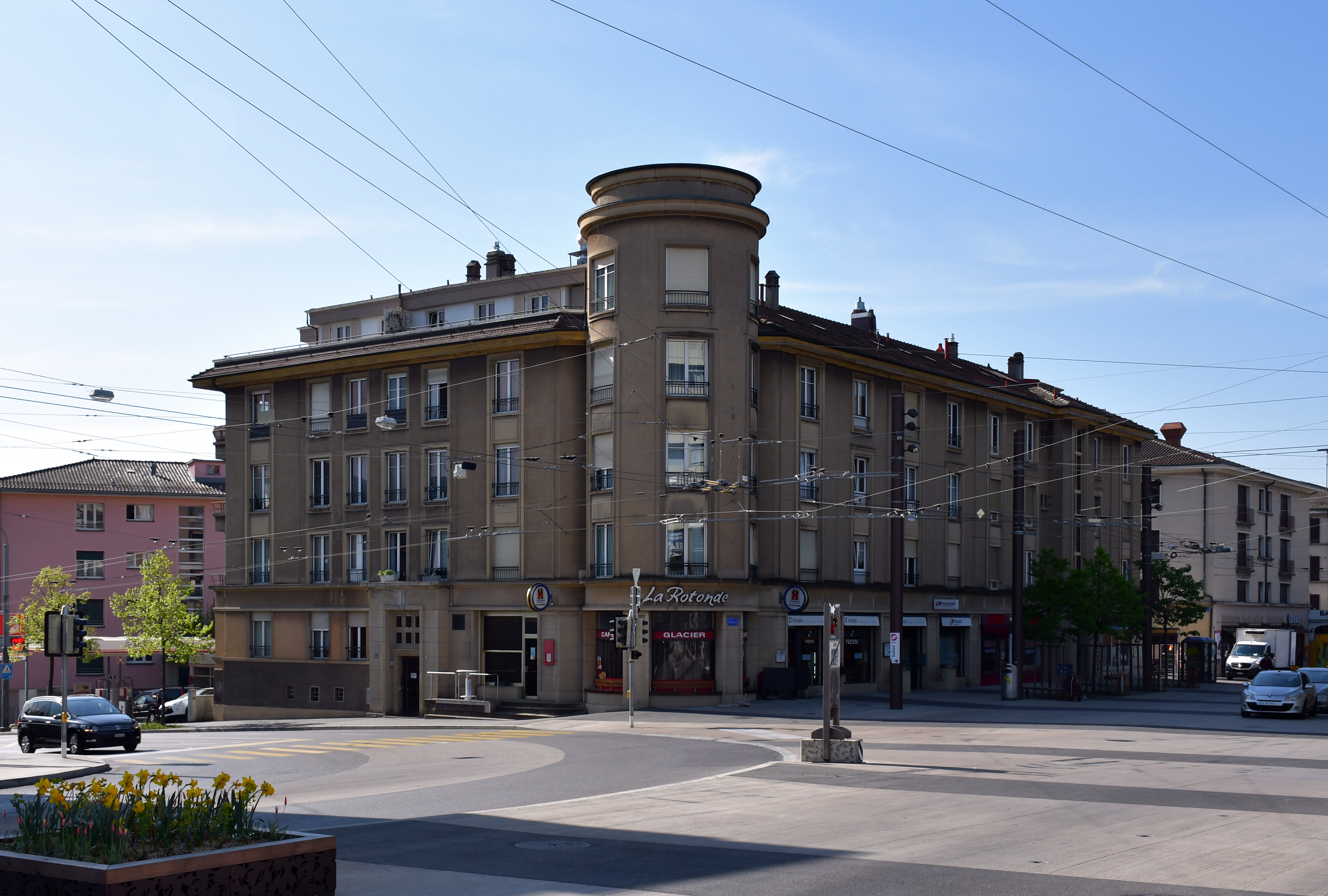 La Rotonde, bâtiment de la place de la Sallaz de Lausanne (Suisse).